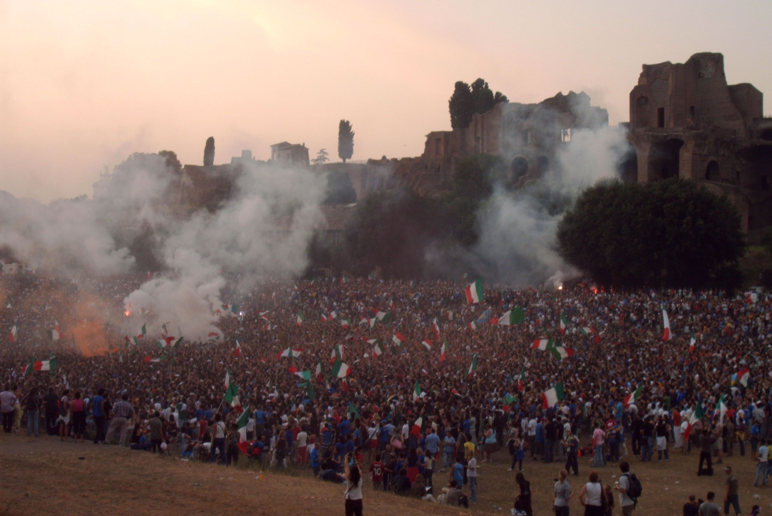 Hinchas italianos celebrando en Roma la victoria de su selección en el mundial de fútbol de Alemania 2006.